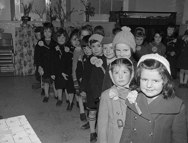 Teitl Cymraeg/Welsh title: Dathlu Gwyl Ddewi yn Abermo Ffotograffydd/Photographer: Geoff Charles (1909-2002) Dyddiad/Date: March 10, 1960. Cyfrwng/Medium: Negydd ffilm / Film negative Cyfeiriad/Reference: (gch21492) Rhif cofnod / Record no.: 3470520 Rhagor o wybodaeth am gasgliad Geoff Charles yn Llyfrgell Genedlaethol Cymru More information about the Geoff Charles Collection at the National Library of Wales